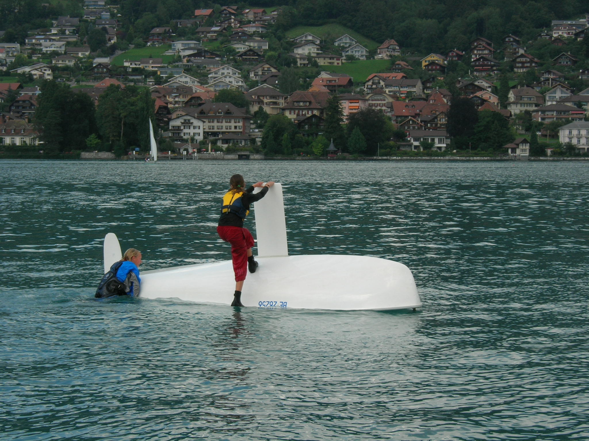 Gekenteter 420er